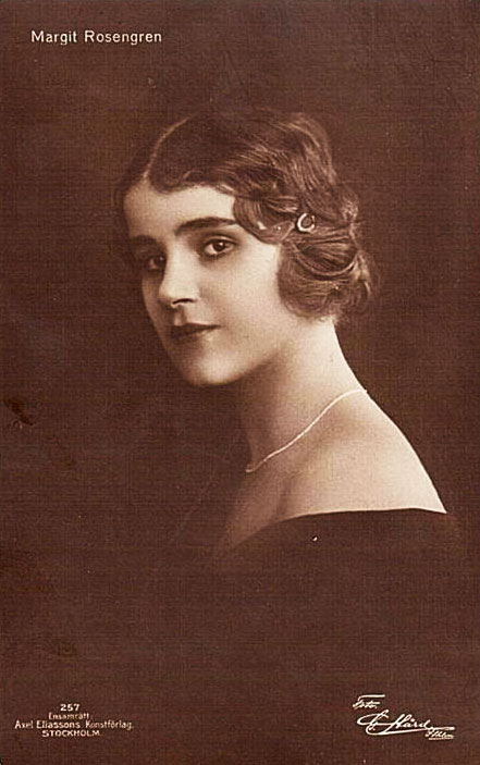 Margit Rosengren